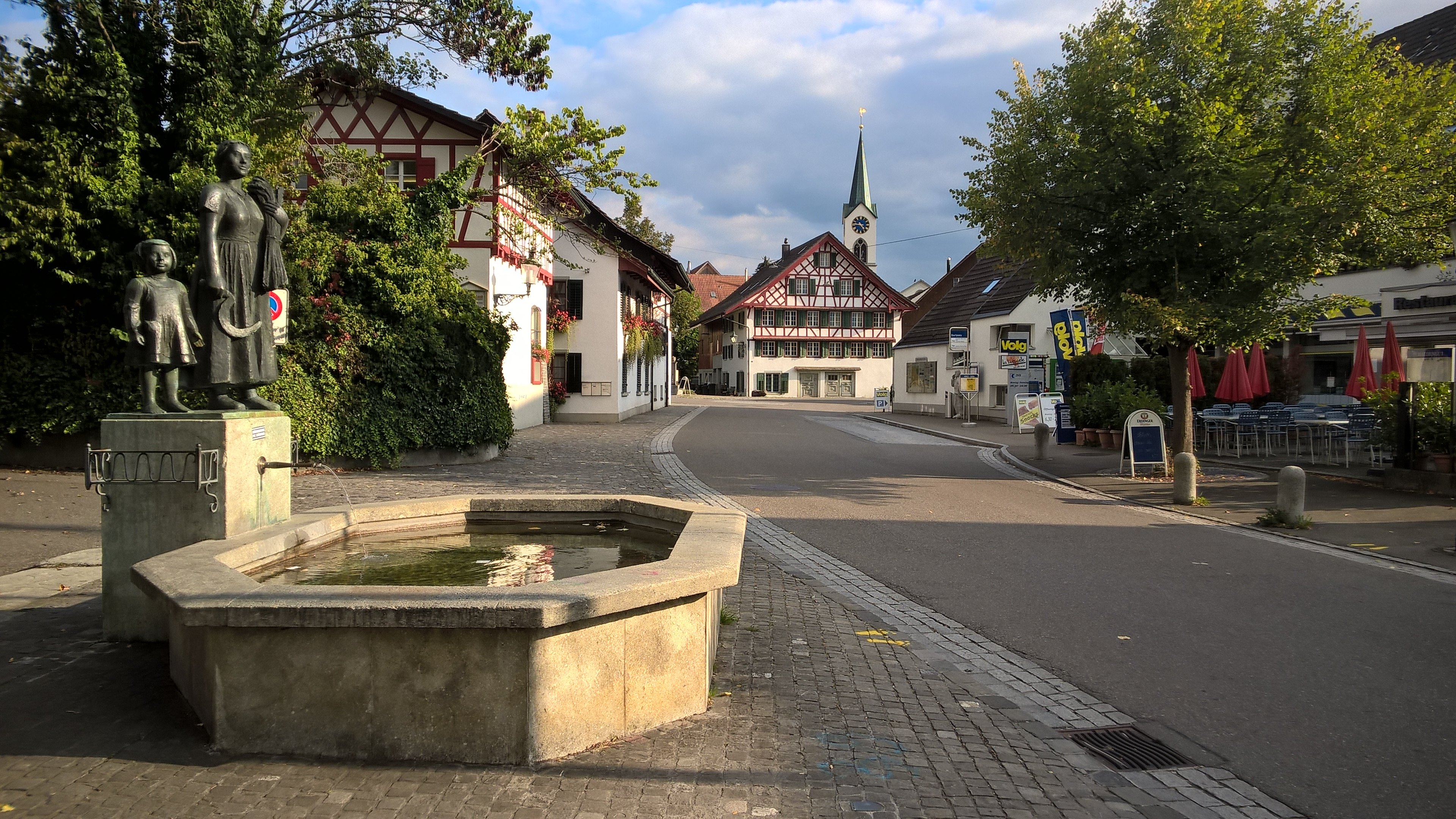 Dorfkern von Wangen ZH, Schweiz